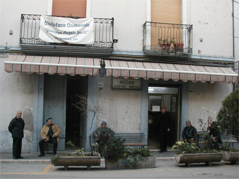 Spezzano Albanese - Biblioteca e Centro Anziani Foto di Luigino C.